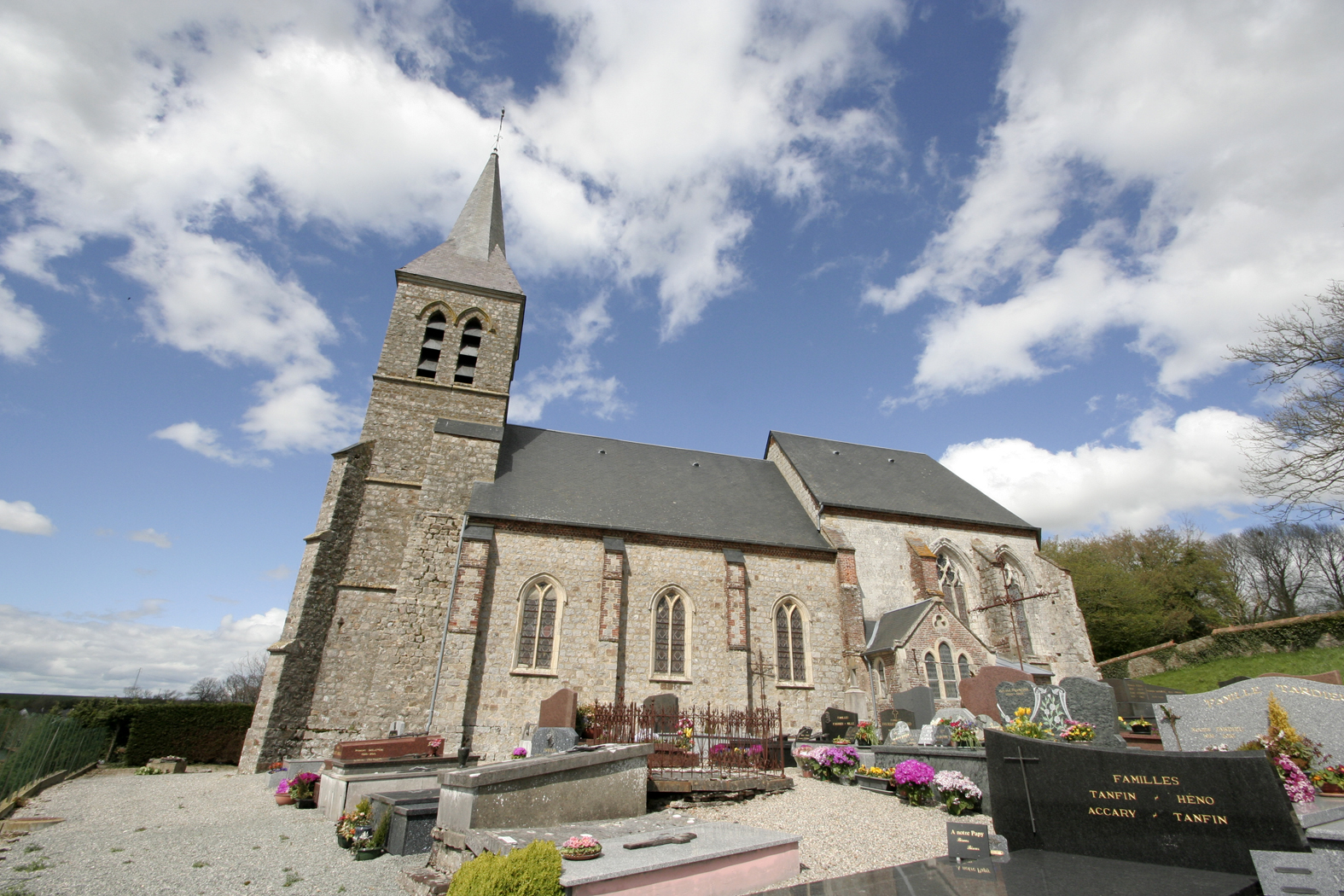 Hubersent église